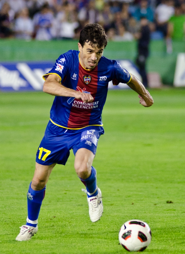 El jugador granota (i ex-jugador groguet) y jugador del Brentford Javi Venta